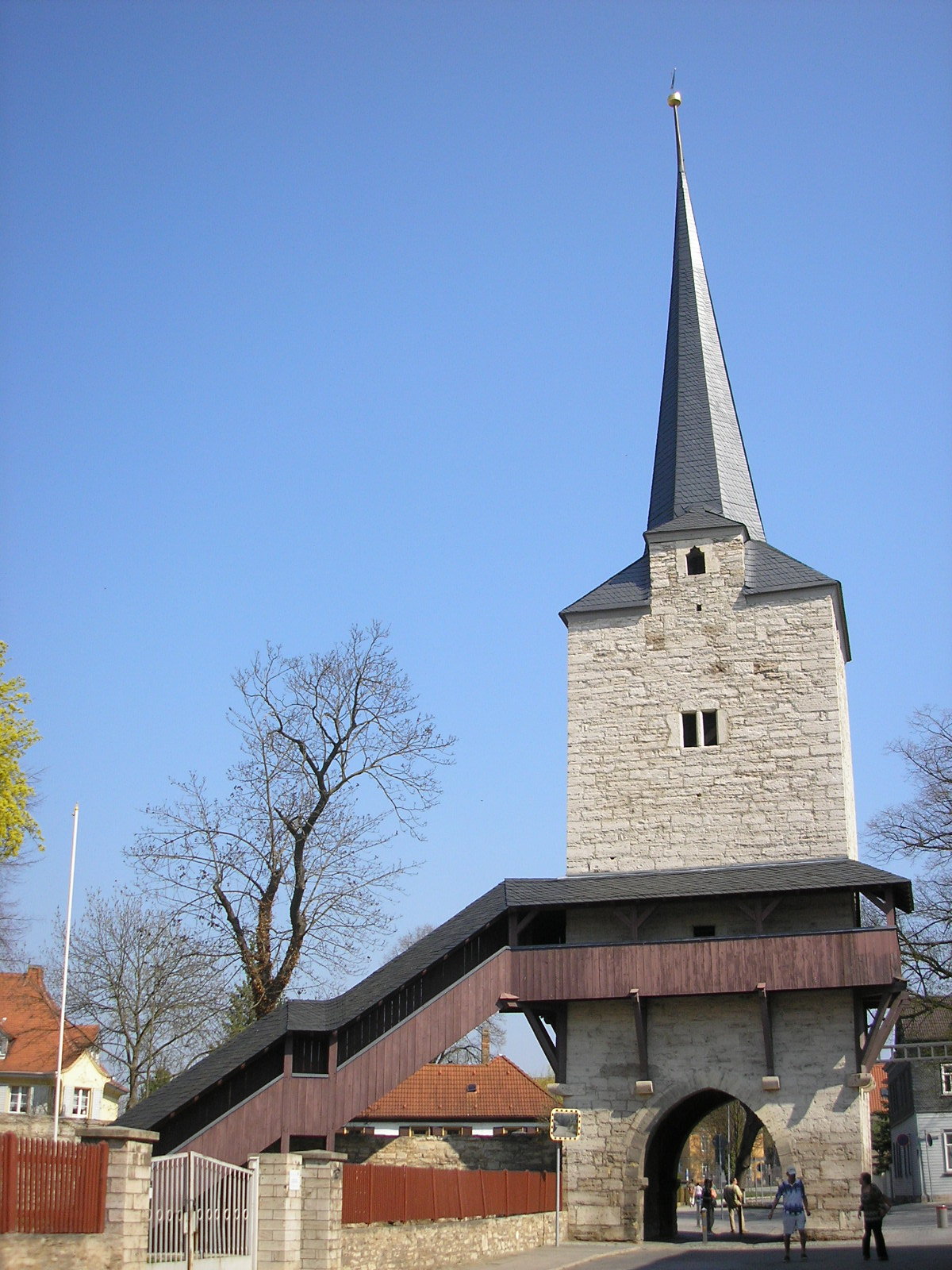 Klagetor, Teil der Stadtbefestigung in Bad Langensalza (Thüringen).